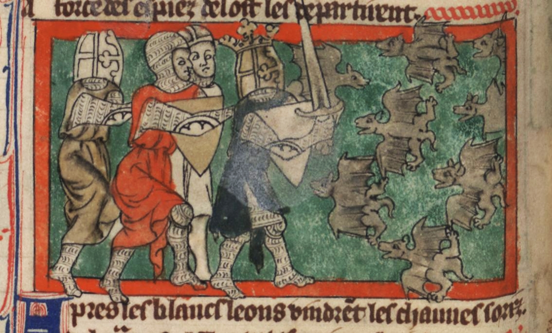 Die Mazedonen unter Alexander dem Großen werden von blutrünstigen Flughunden angegriffen. Die Episode stammt aus dem normannischen Alexanderroman Roman de Toute Chevalerie des Thomas de Kent.